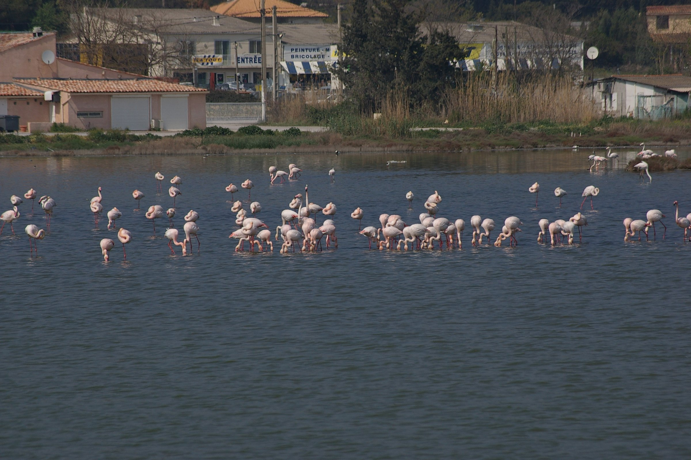 Flamingos on Étang de Thau, France.